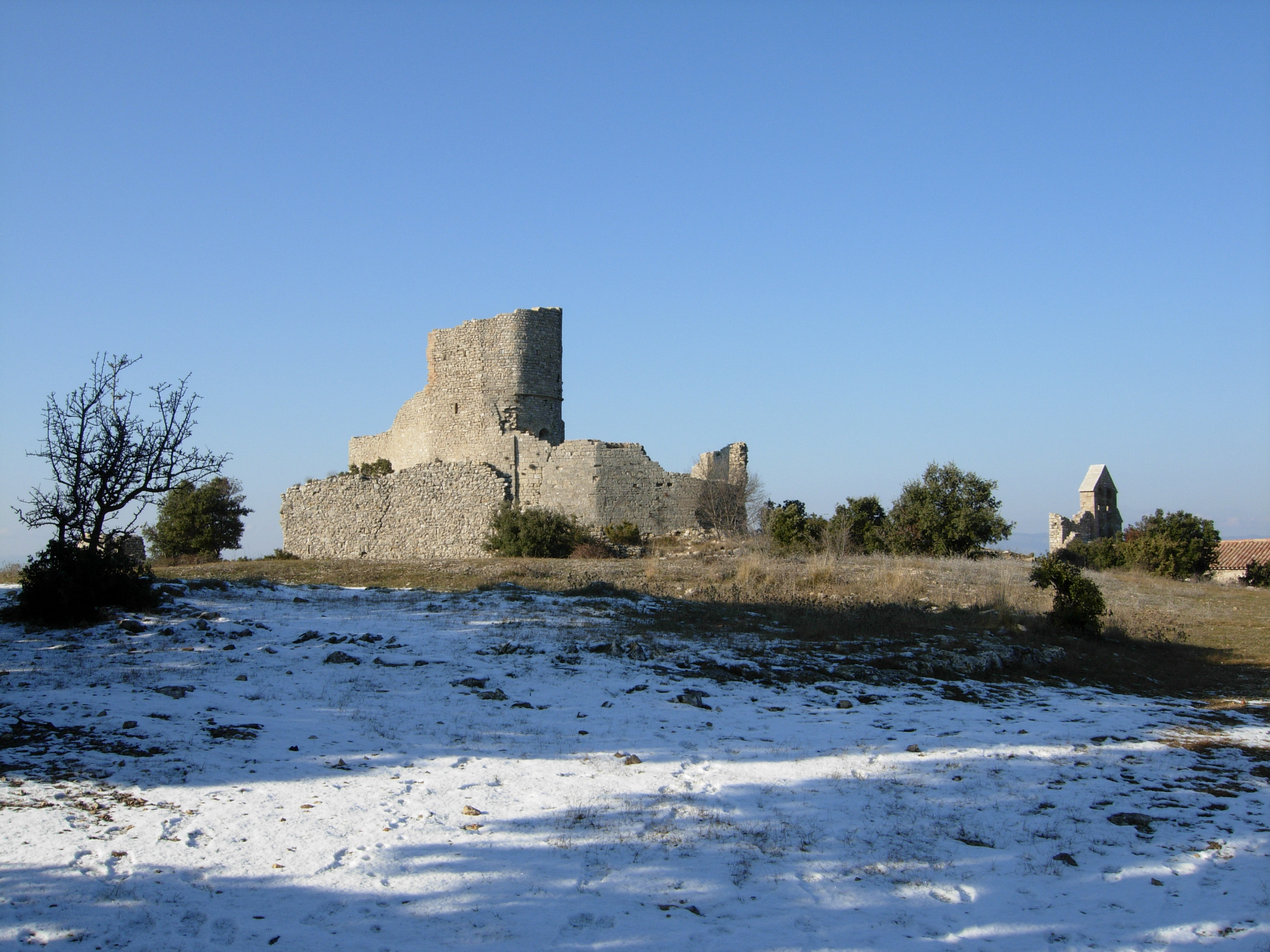 Aumelas (Hérault) - château et chapelle castrale, un jour de neige.